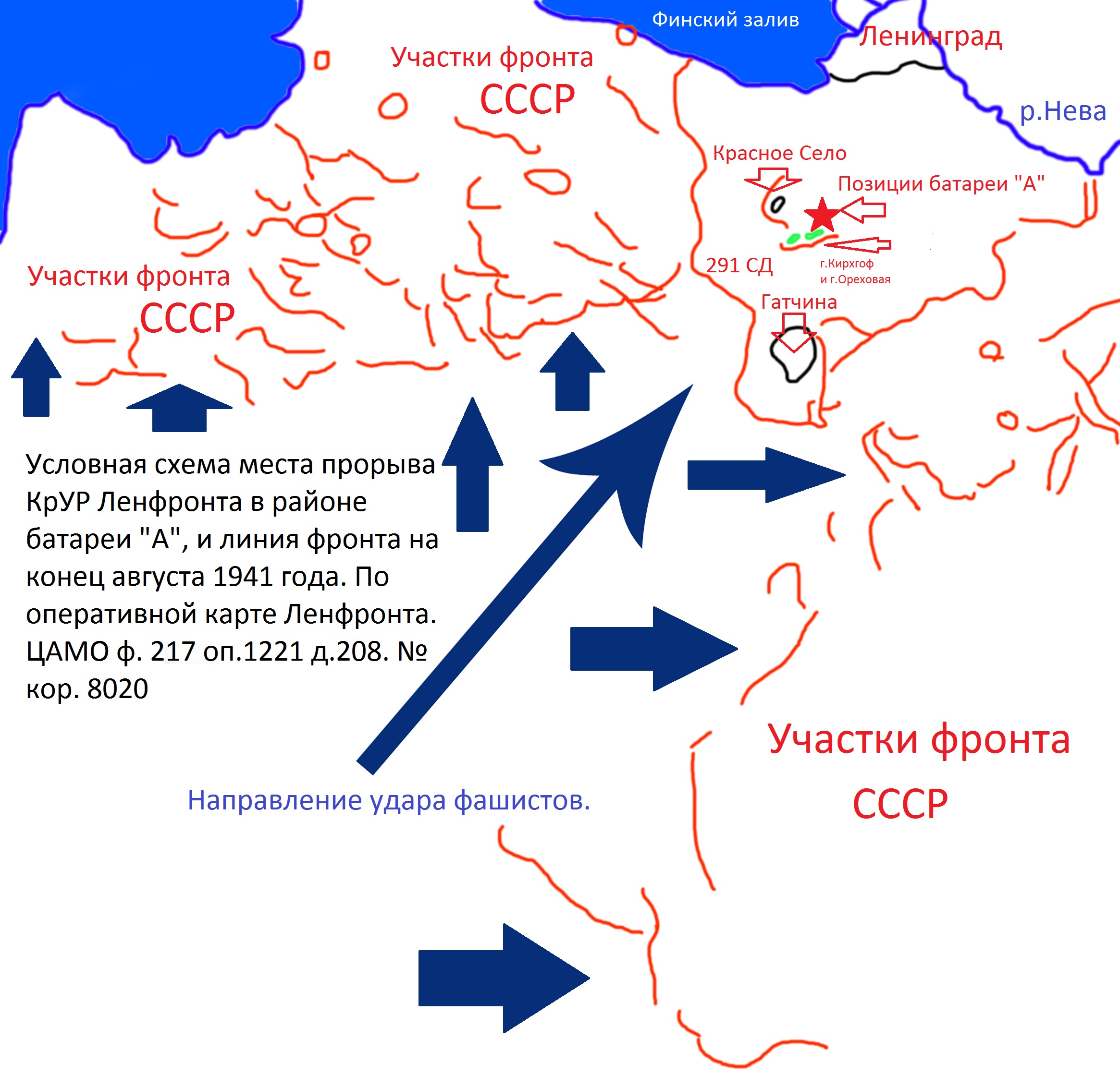 Условная схема места прорыва КрУР Ленфронта в районе батареи "А", и линия фронта на конец августа 1941г. По оперативной карте Ленфронта ЦАМО ф.217, оп.1221, д.208, № кор. 8020